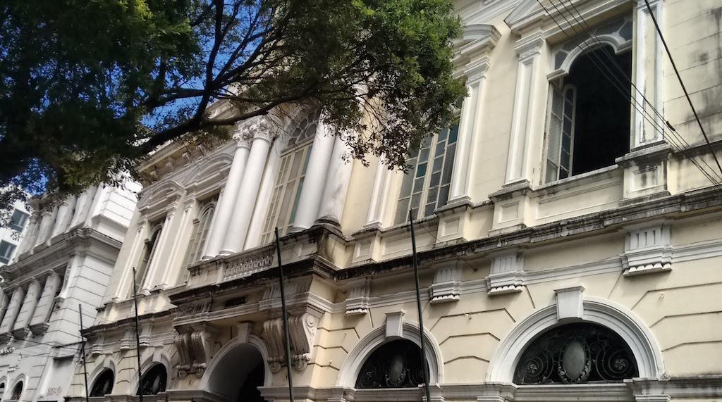 Fachada do Gabinete Português de Leitura na rua do Imperador, no Recife, Brasil.